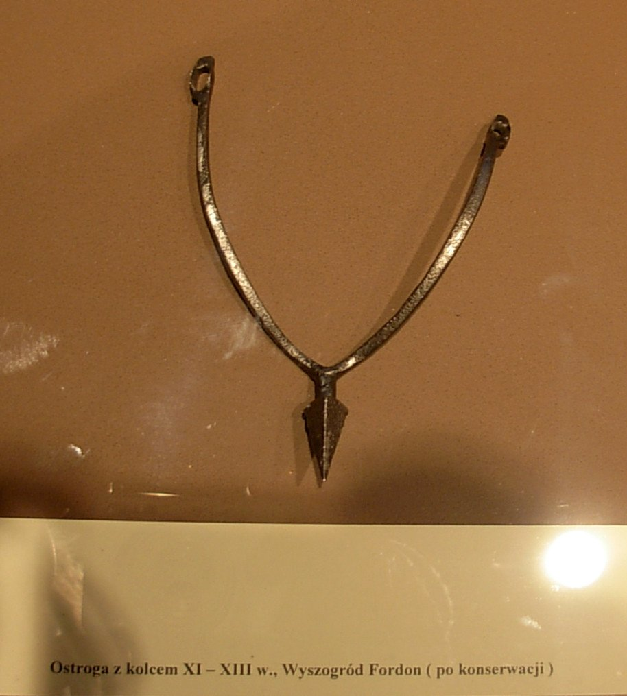 Ostroga z kolcem (XI-XIII w.) z grodziska Wyszogród w Bydgoszczy